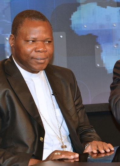 Dieudonné Nzapalainga, archevêque de Bangui (République Centrafricaine) en mars 2014.